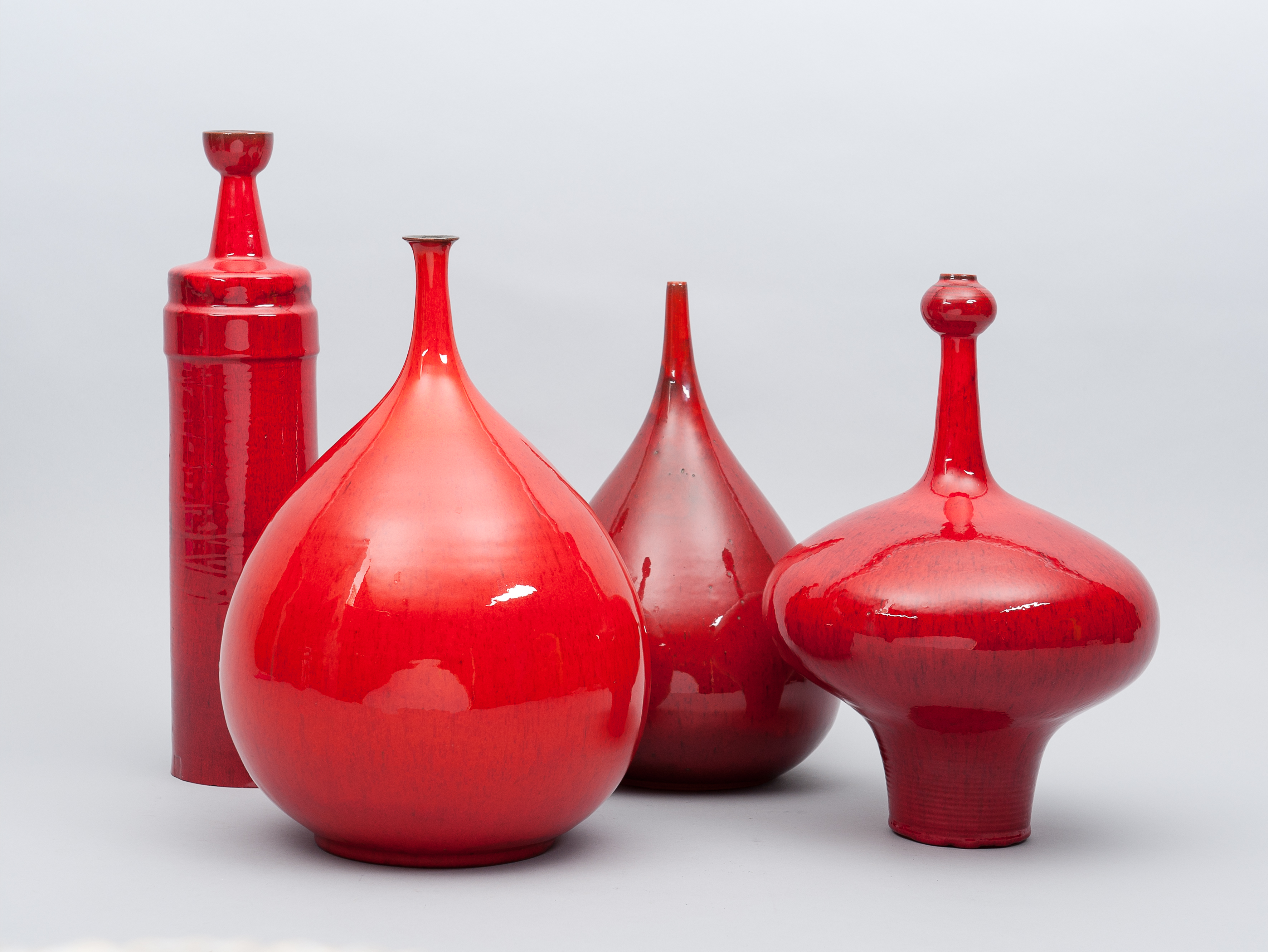 rode vazen